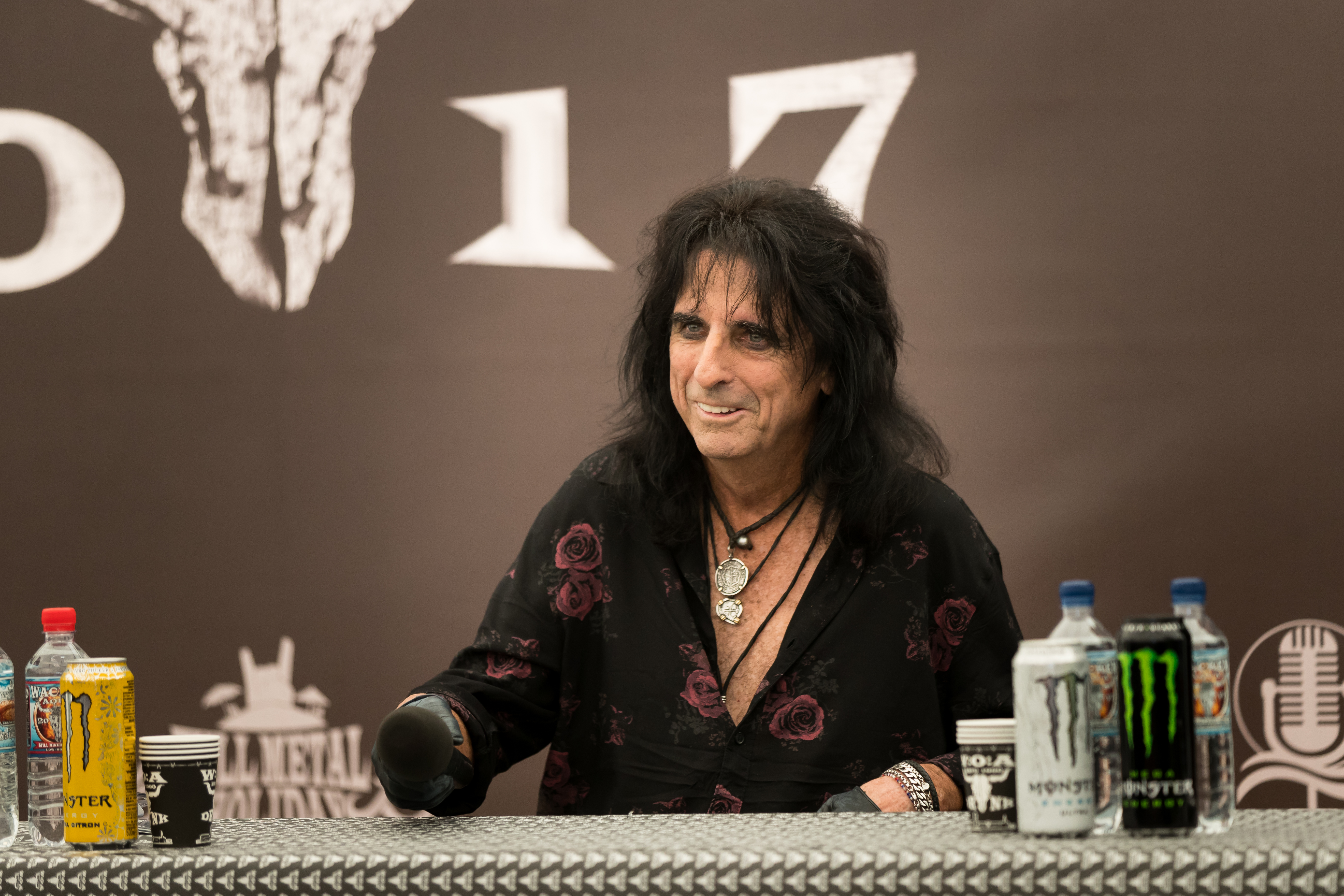 Alice Cooper during Wacken Open Air at Schleswig-Holstein, Wacken, , Germany on 2017-08-05, Photo: Sven Mandel